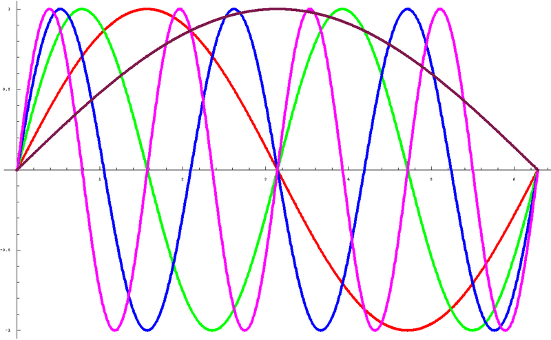 Frekvens: Et annet bilde av sinusbølger.